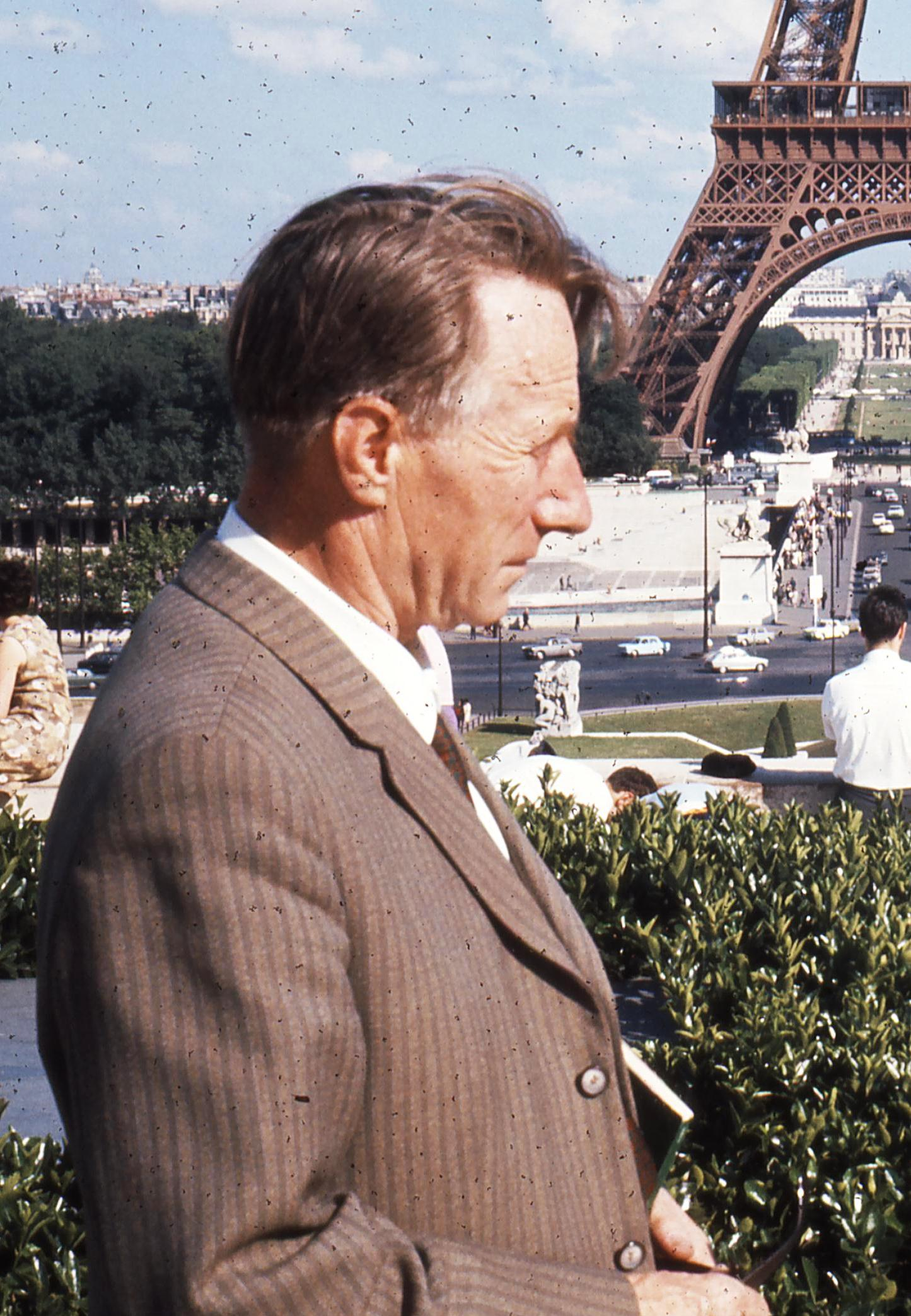 Richard Modlinger auf der CIGRE-Tagung in Paris 1966